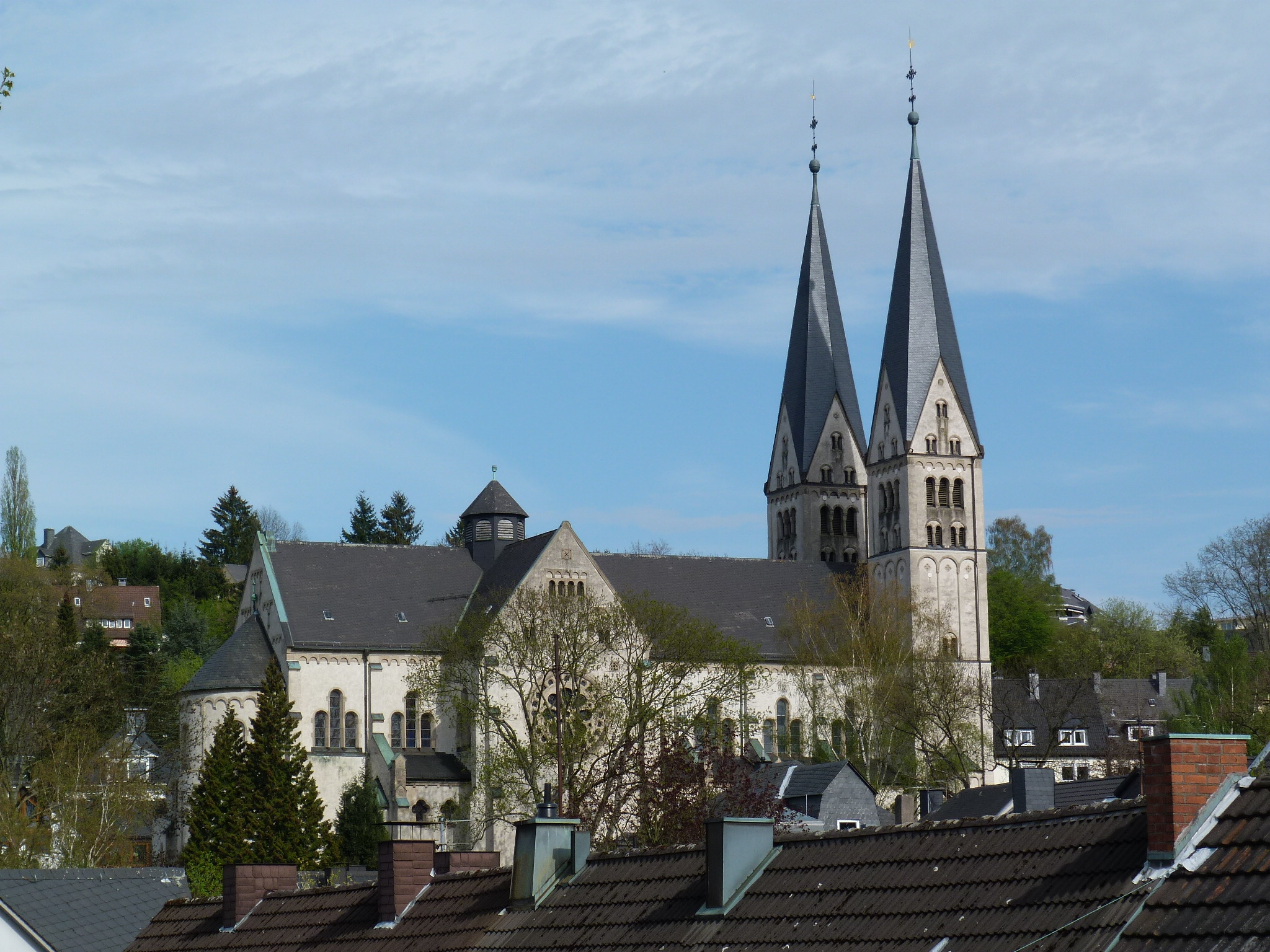 St. Michaelskirche Siegen von Westen aus gesehen